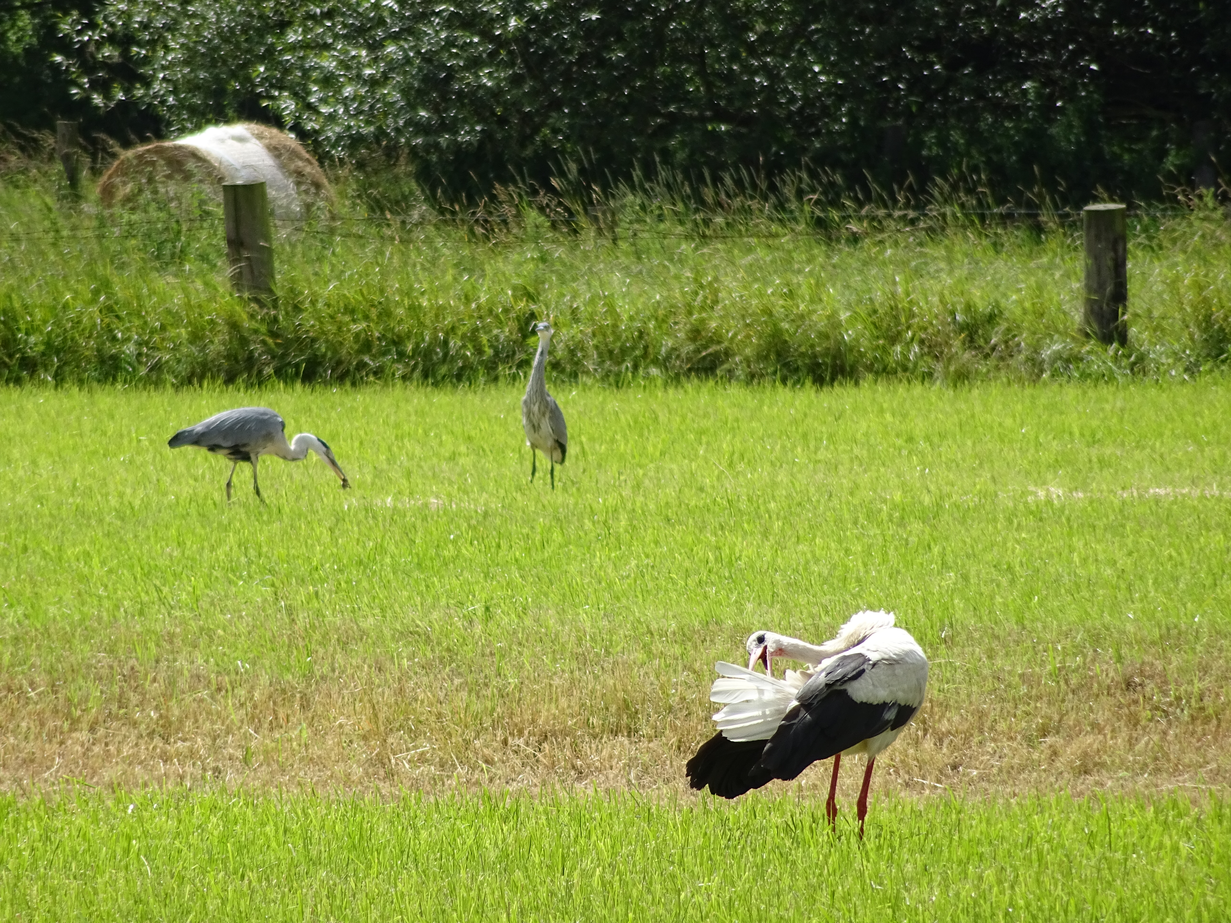 NSG Alte Leine zwiscen Wilkenburg, Alt-Laatzen und Grasdorf; Graureiher und Weißstorch